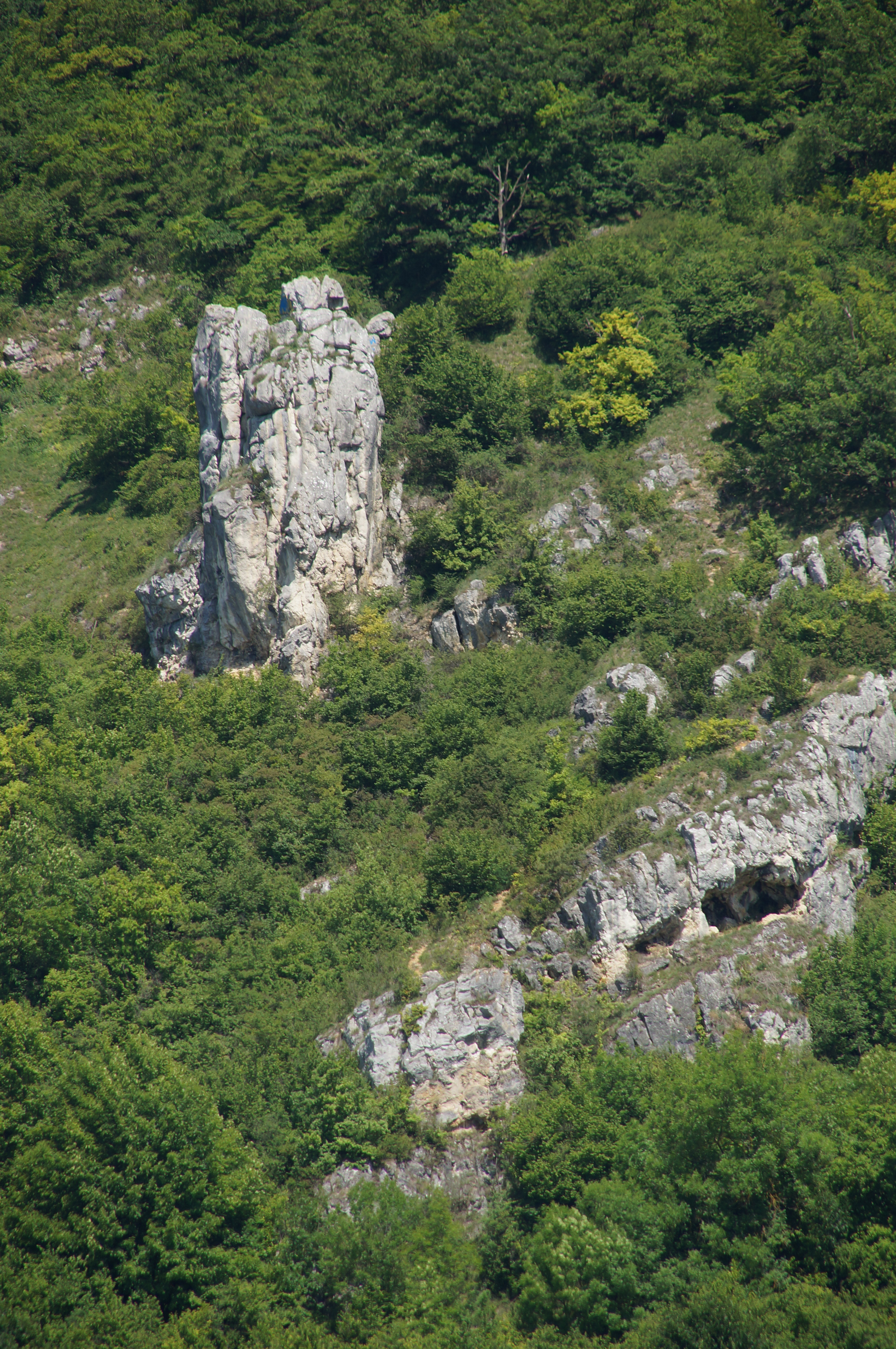 Felsformation im Naturschutzgebiet "Am Keilstein" oberhalb von Schwabelweis, Regensburg